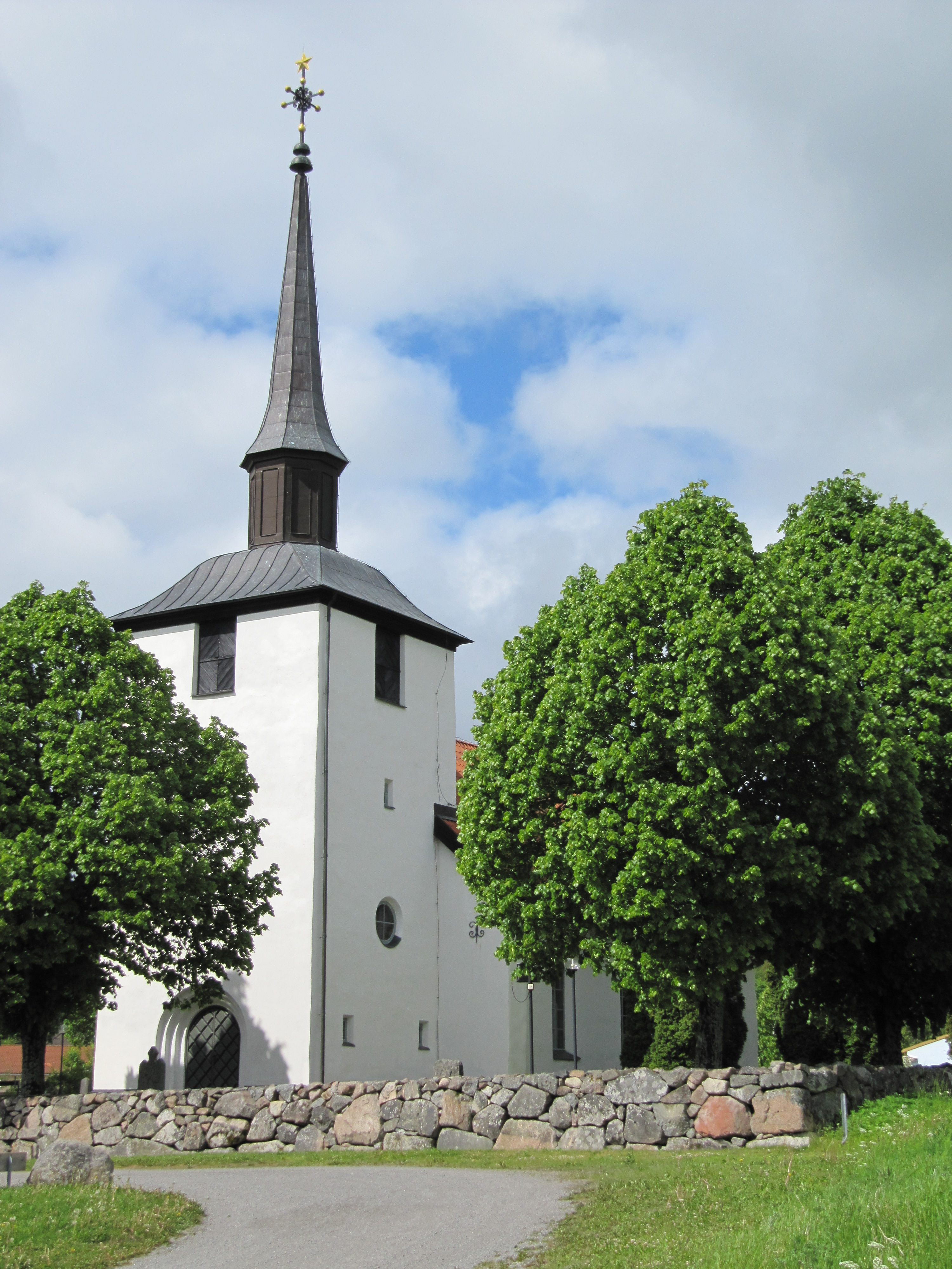 Ramsta kyrka